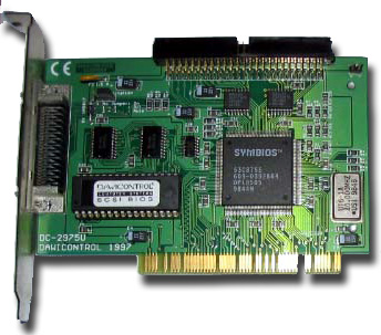 SCSI-3 DC-2975U Controller von Dawi Control mit Symbios Logic Chipsatz